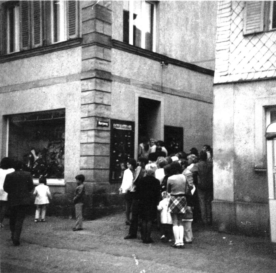 Kundenschlange vor Schuh-Schneider am Plan (heute Optik Sievert)